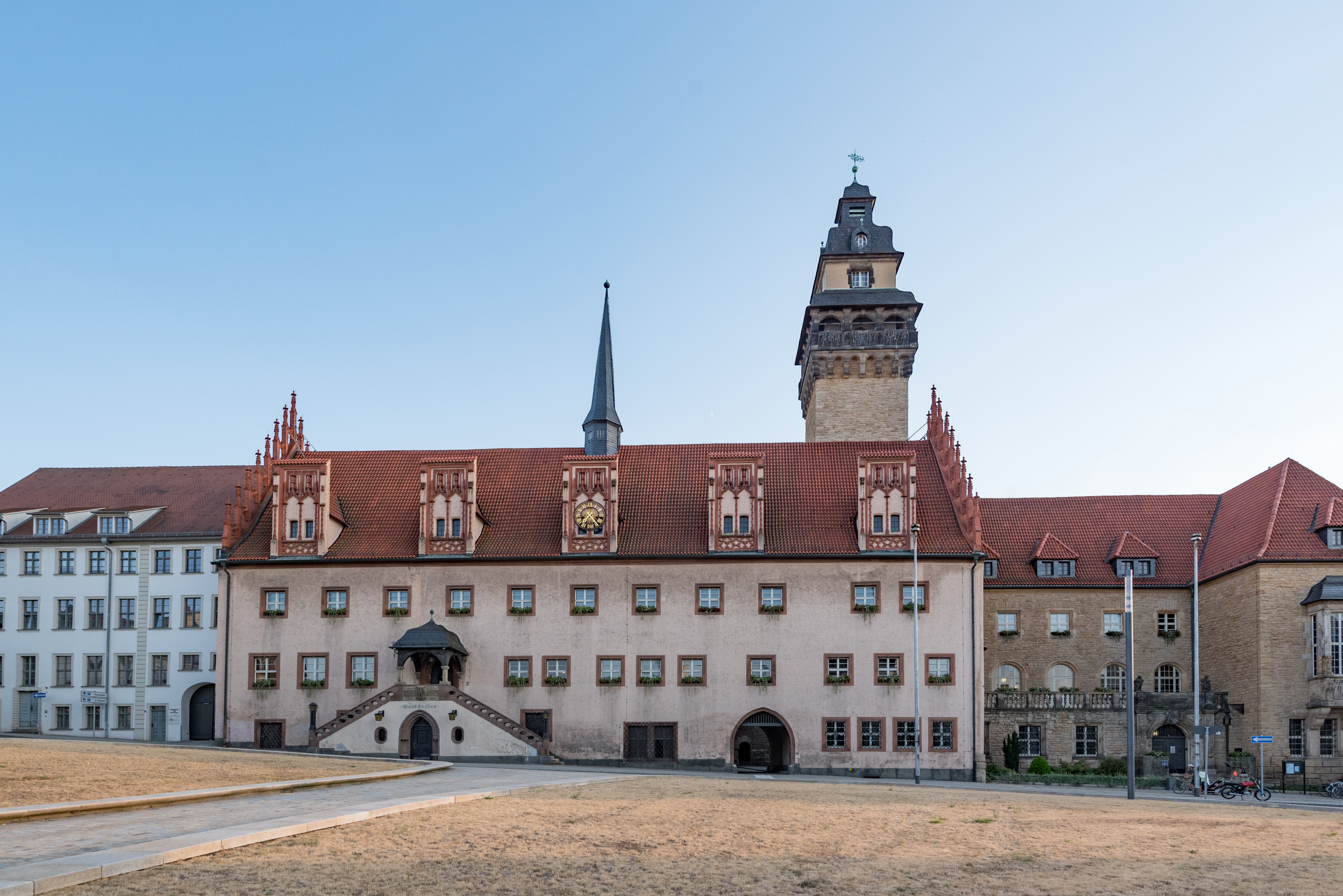 Zeitz, Altmarkt 1